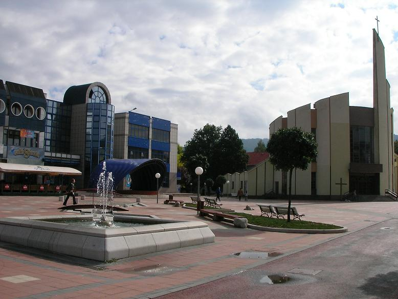 Slovakia, Svidník, central place